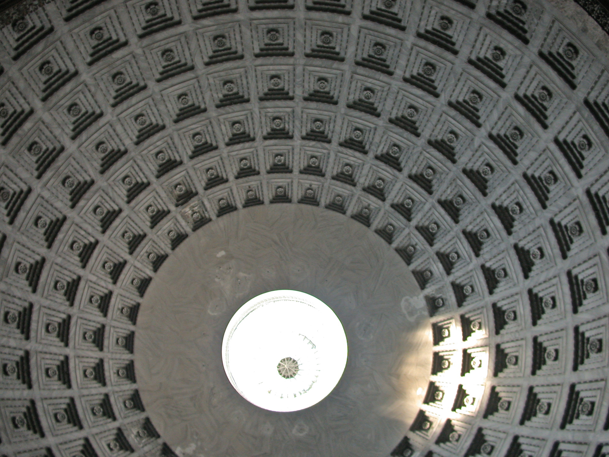 Italia, regione Campania, Napoli, chiesa di San Francesco da Paola (piazza del Plebiscito), interno, la cupola vista dal basso.